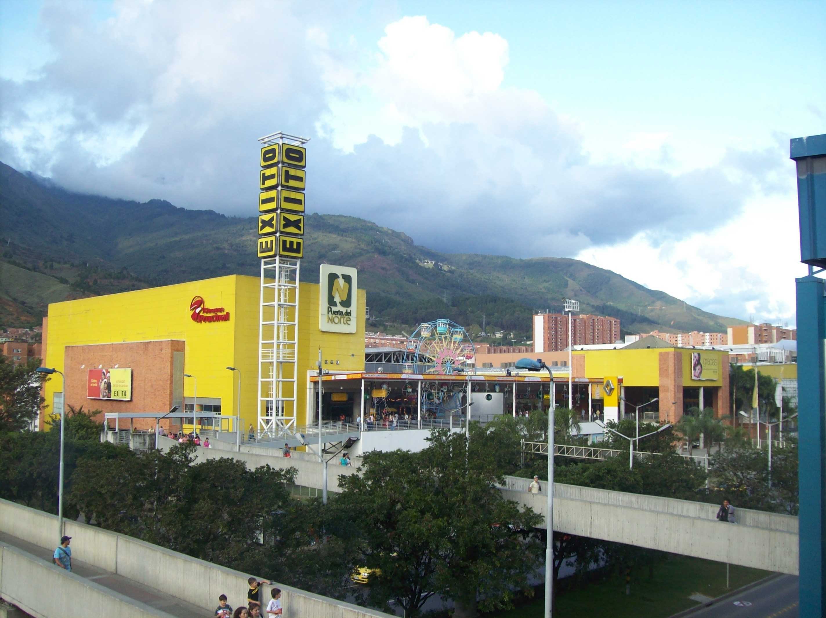 Aspecto externo del Centro Comercial Puerta del Norte desde la plataforma de la Estación Niquía, en Bello.